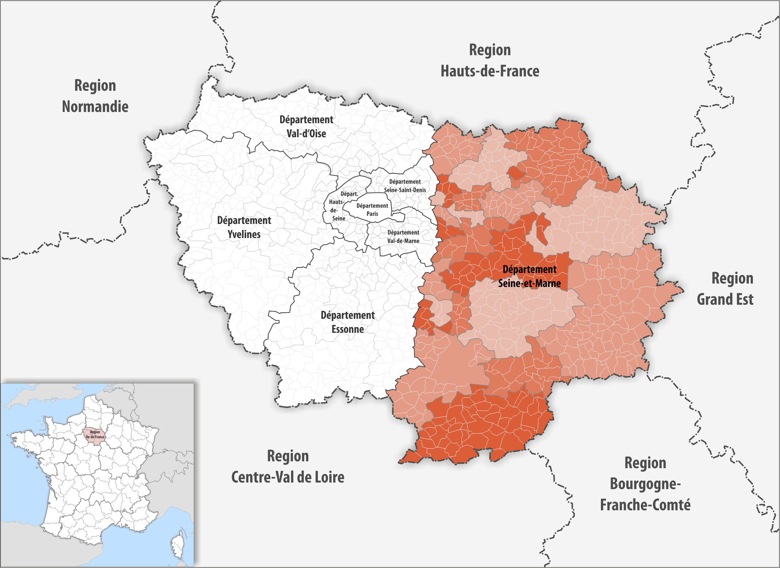 Lage des Departements Seine-et-Marne